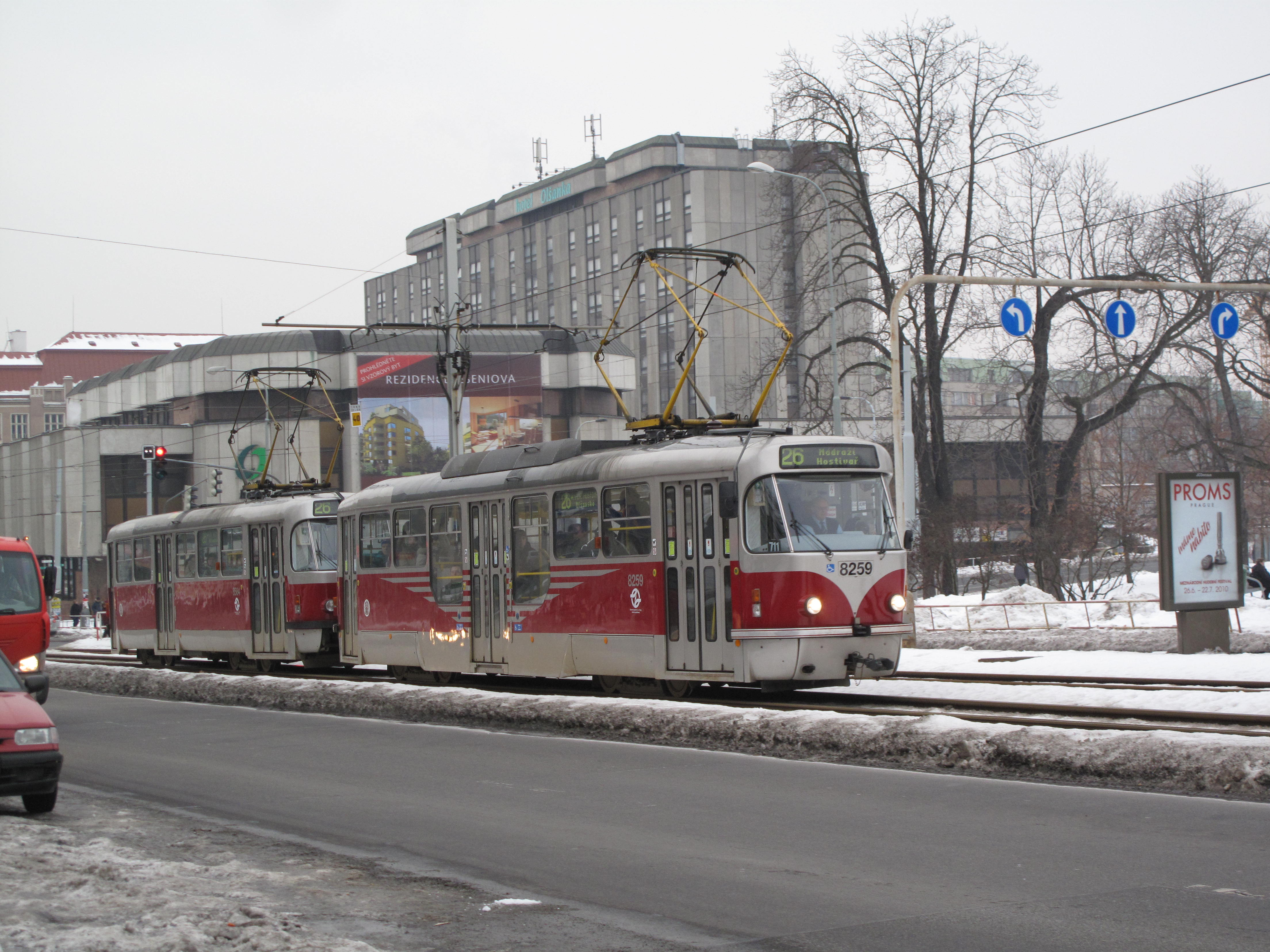 Olšanská